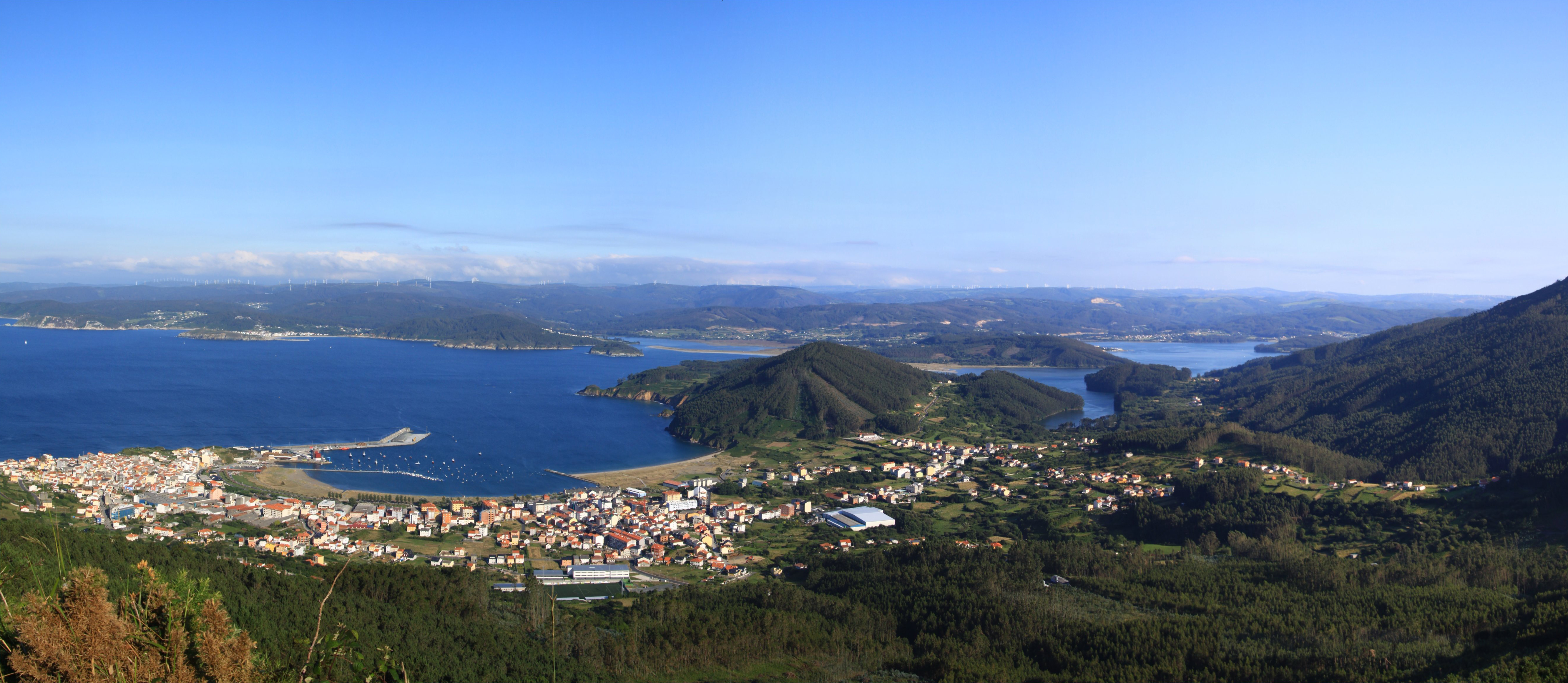 Cariño, Ortegal, ría de Ortigueira, Galiza La ría de Ortigueira, es una ría gallega de la provincia de La Coruña, en Galicia, España. Está formada por la desembocadura del río Mera, sus aguas bañan los municipios de Cariño y Ortigueira.